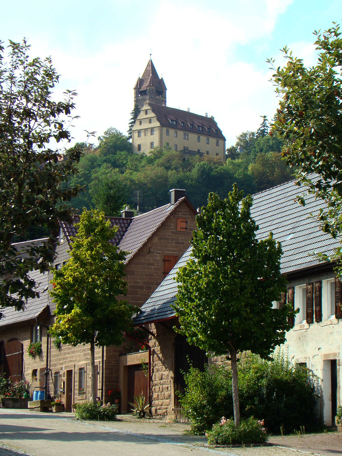 Schloss Stocksberg von Stockheim gesehen